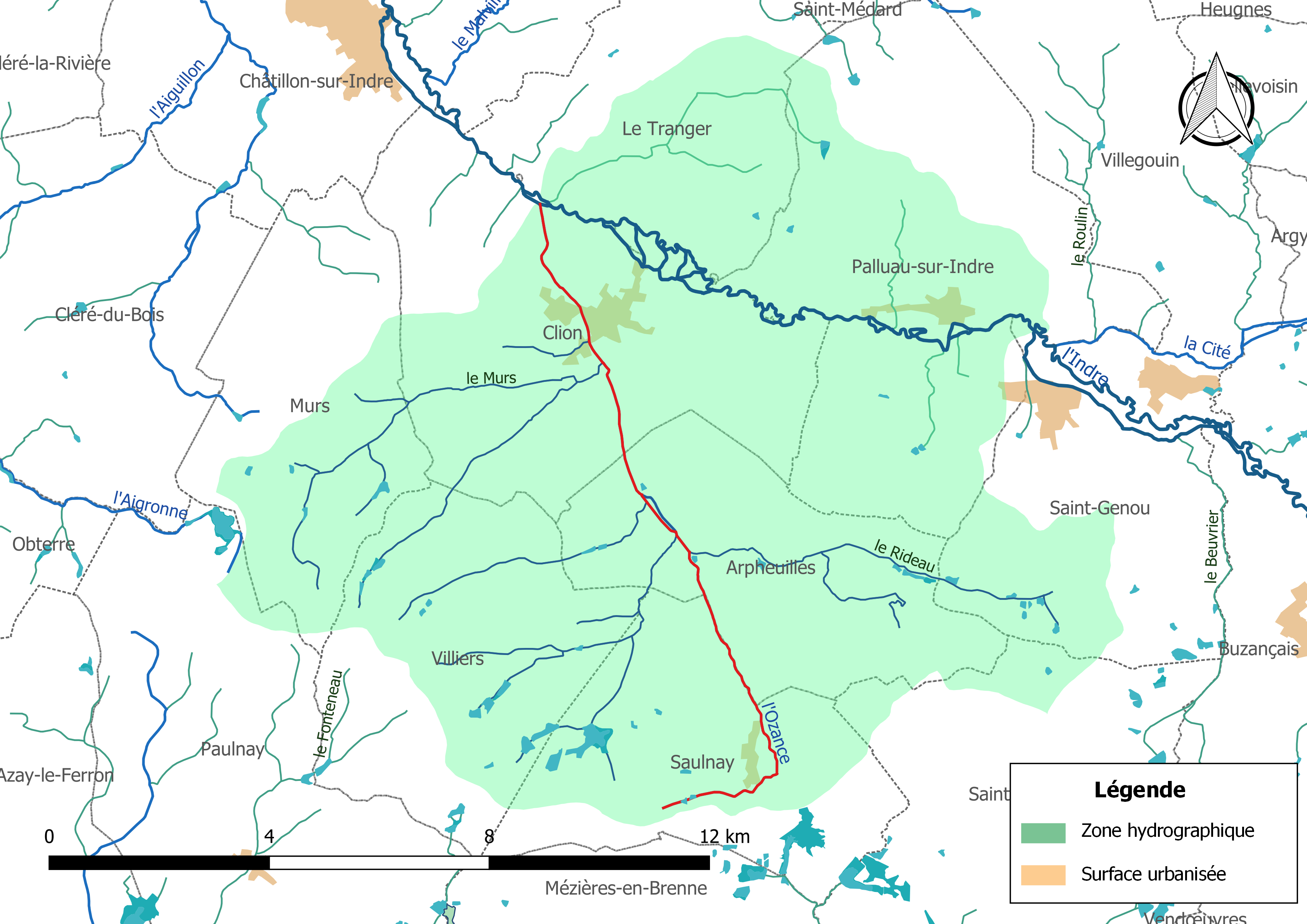 Carte du cours d'eau « l'Ozance » (France) et de la zone hydrographique dans laquelle il s'insère.